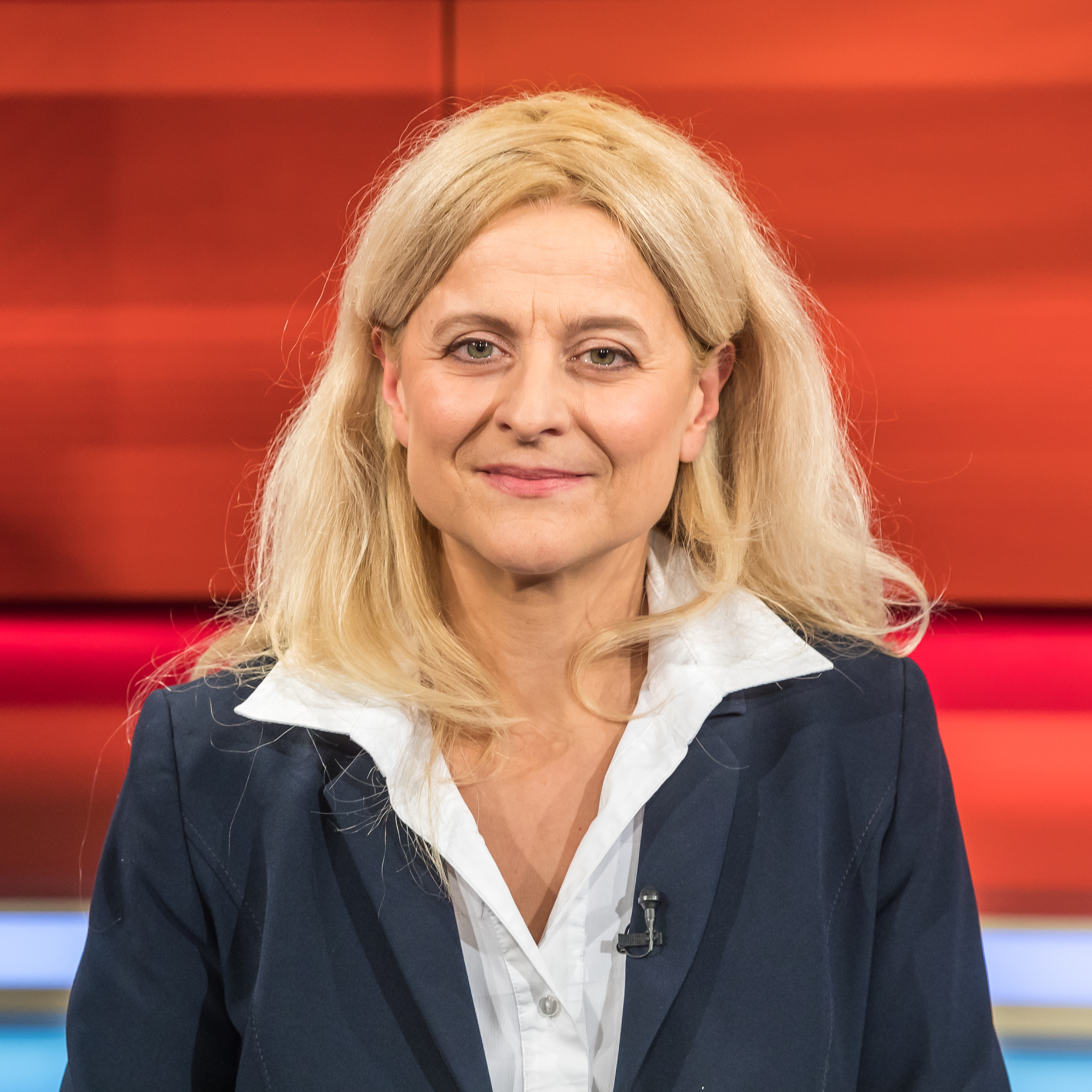 Pressetermin nach der Sendung „Hart aber Fair“ am 10. Februar 2020. Thema der Sendung: „Jetzt auch die CDU: Stürzt die nächste Regierungspartei ins Chaos?" Foto: Kristina Dunz, Journalistin; stellv. Leiterin des Parlamentsbüros der "Rheinischen Post"